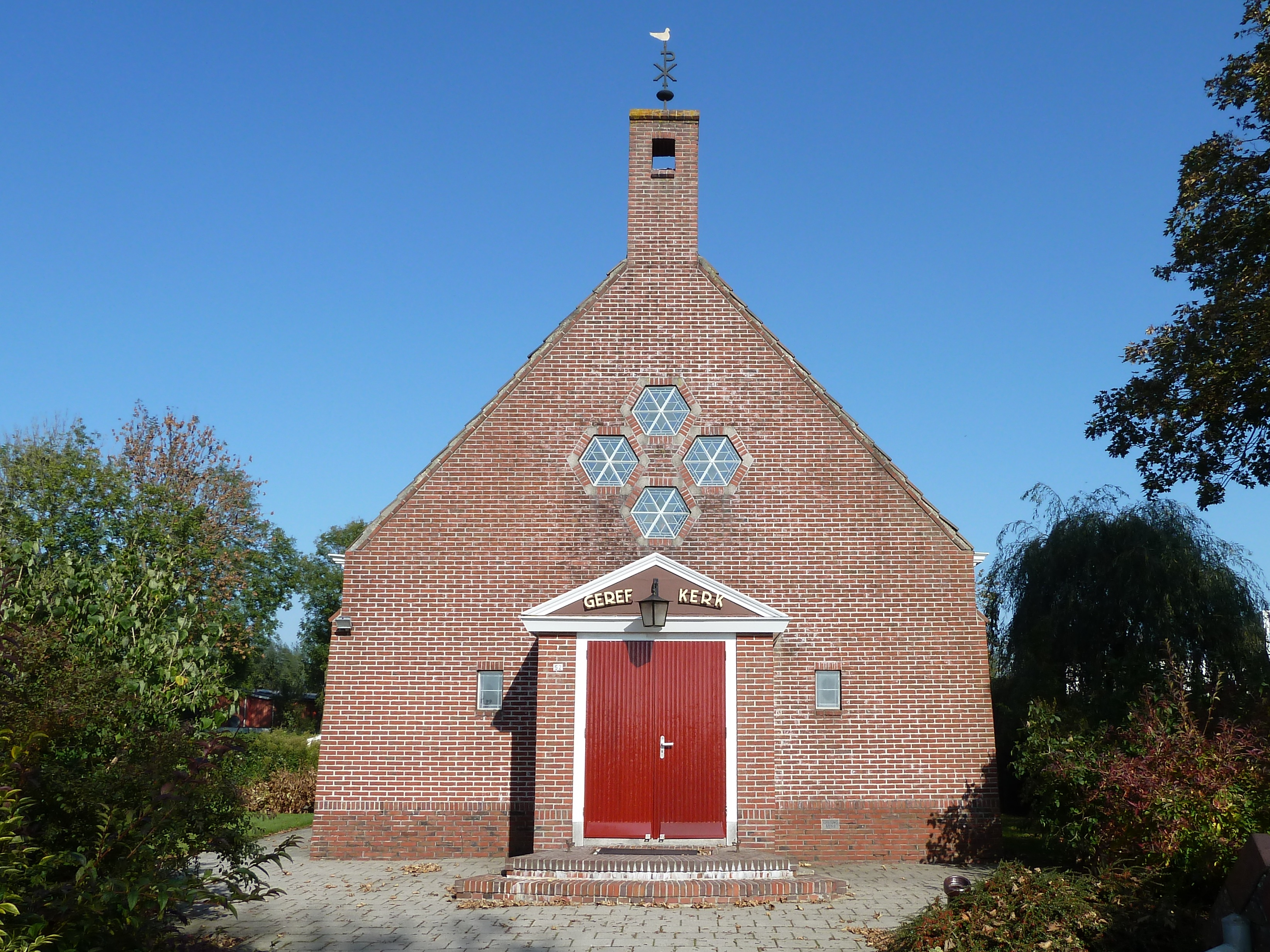 Gereformeerde kerk uit 1952 van Godlinze.